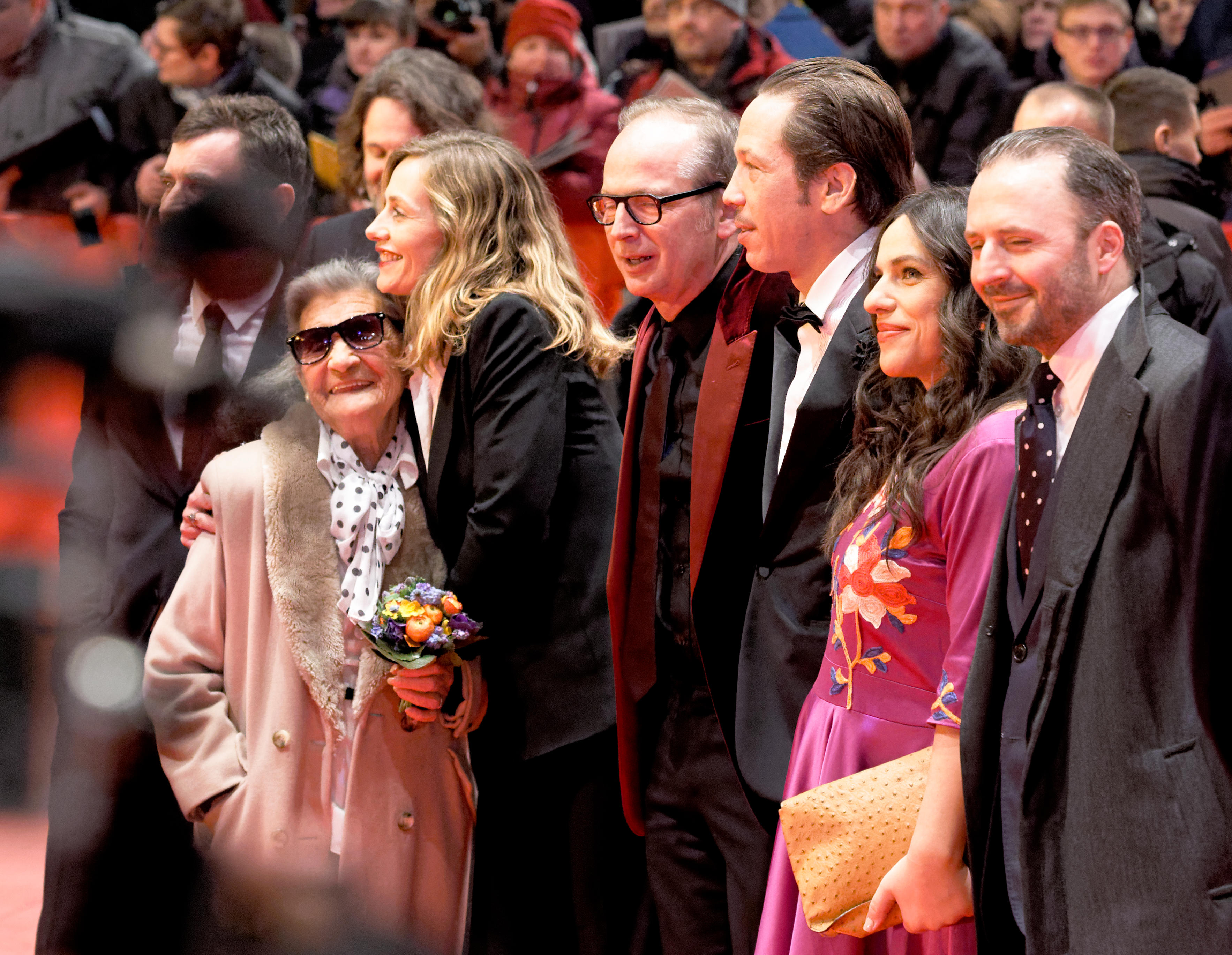 Cast & Crew von Django zur Weltpremiere bei der Berlinale 2017